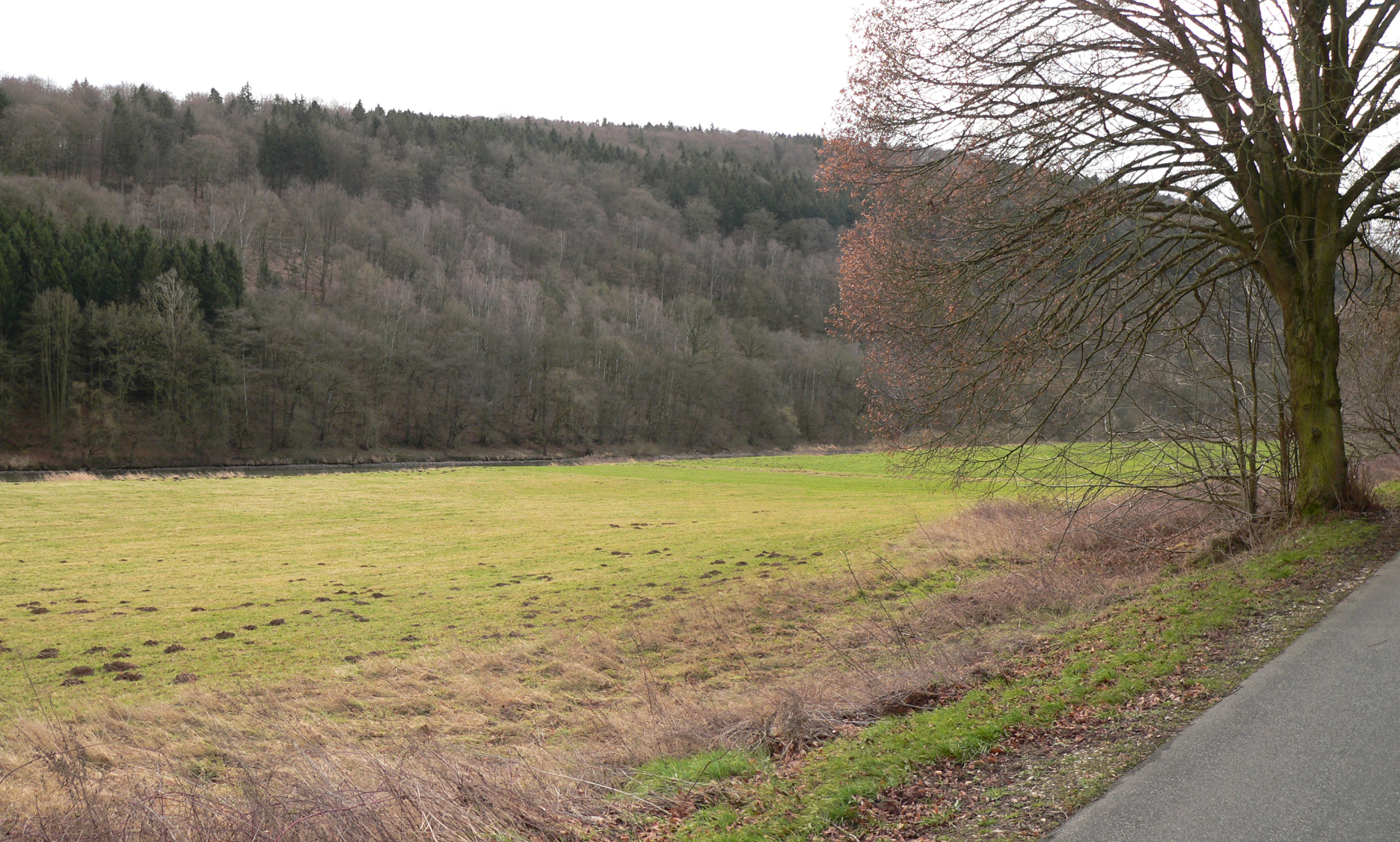 Fulda im Naturpark Münden bei Wilhelmshausen (Gem. Fuldatal)